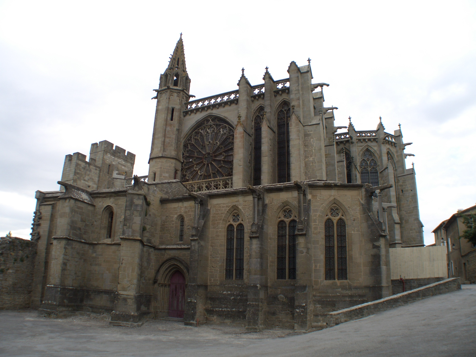 Kirche innerhalb der Cité